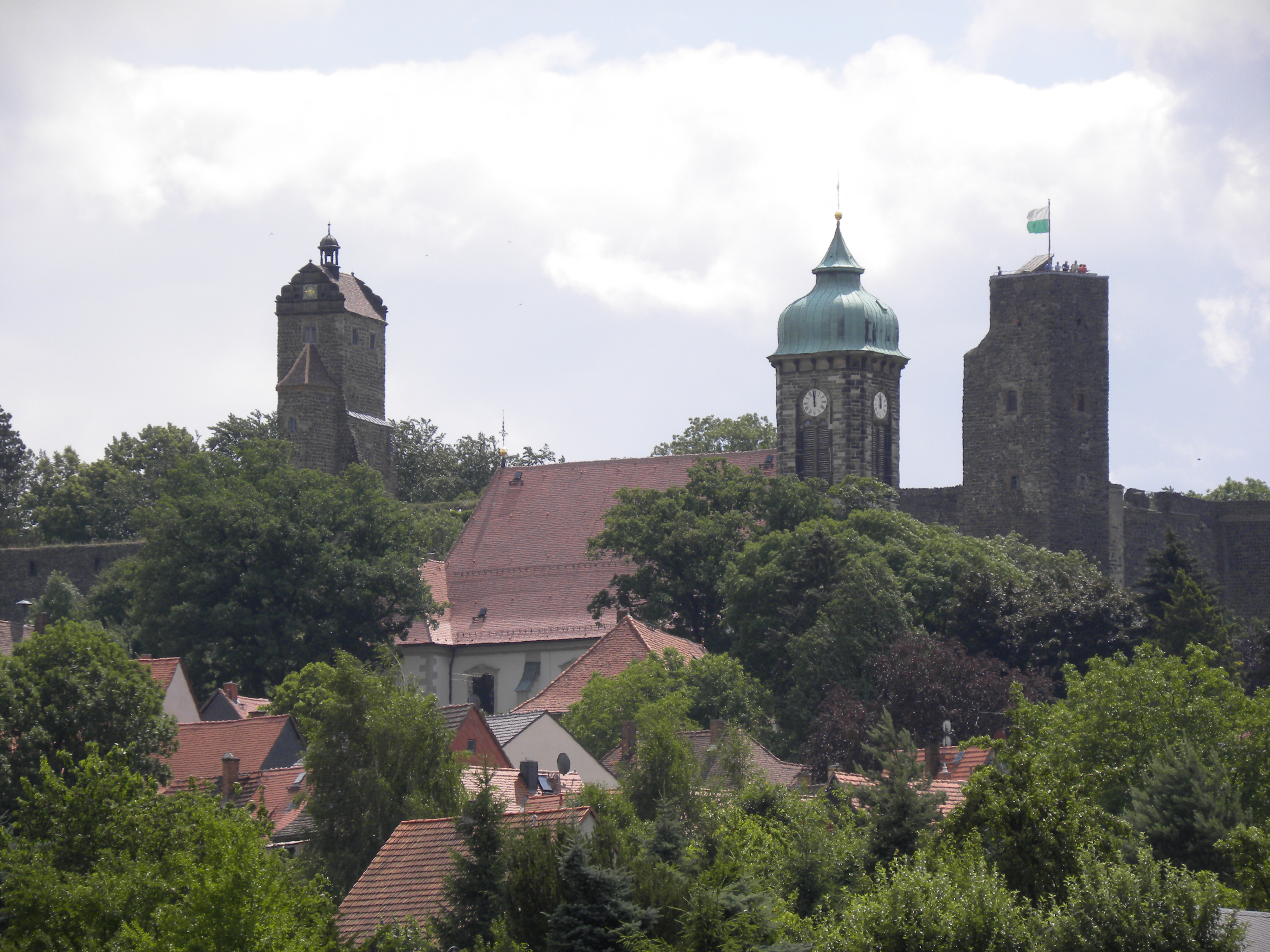 Stadt Stolpen mit der Burg. Foto: A. d´Orfey, Kunst im Licht, München 2006